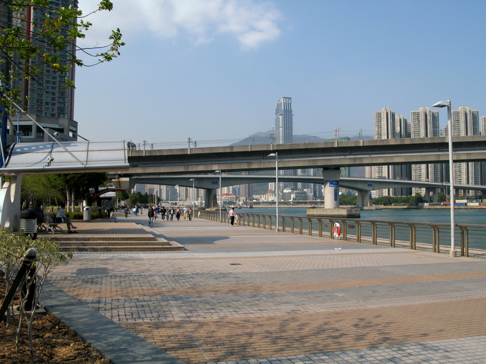 HK Tsing Yi Promenade